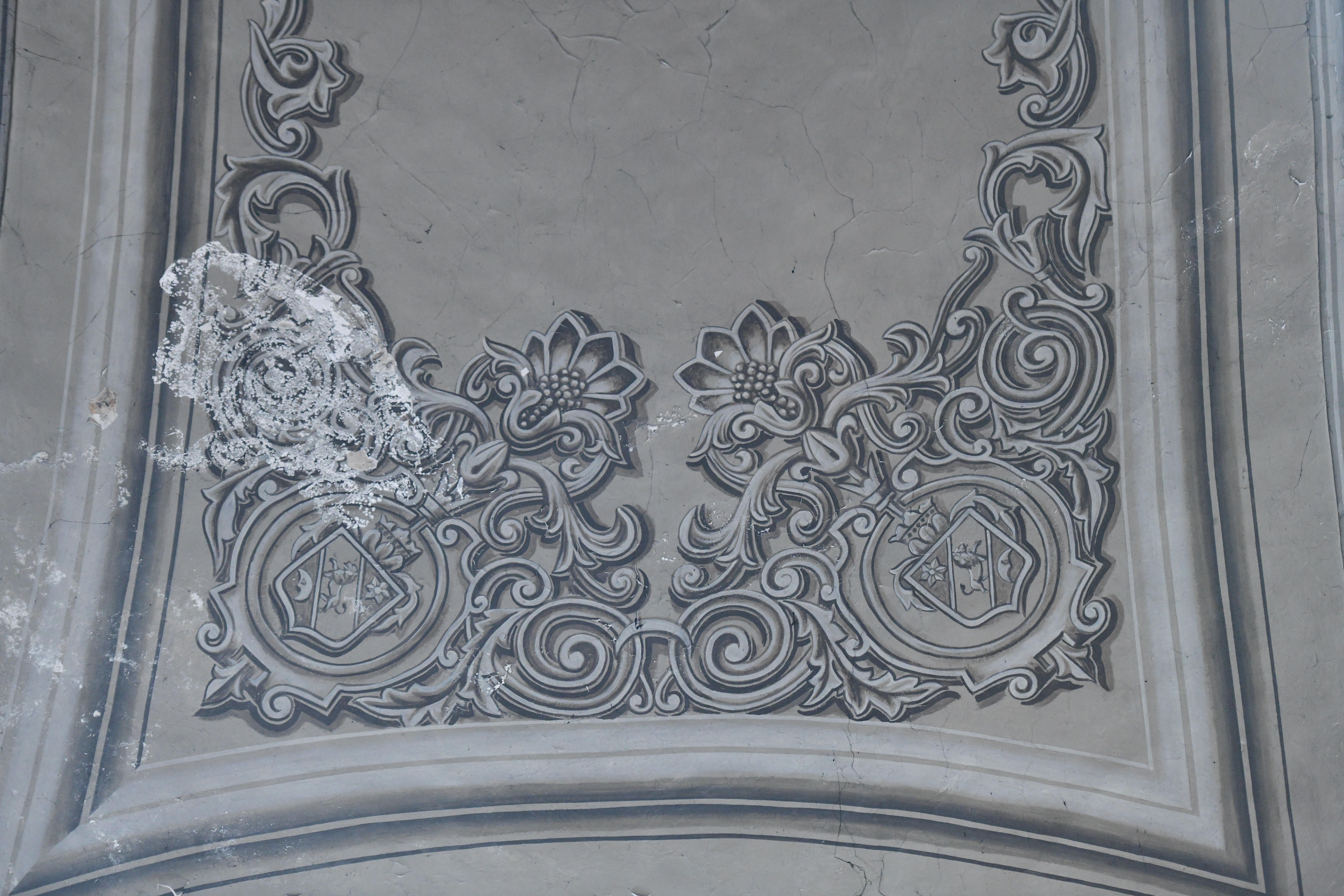 Постављен из захвалности Исидору пл. Николићу за велики допринос у обнављању србобранске цркве после уништења 1949. године.